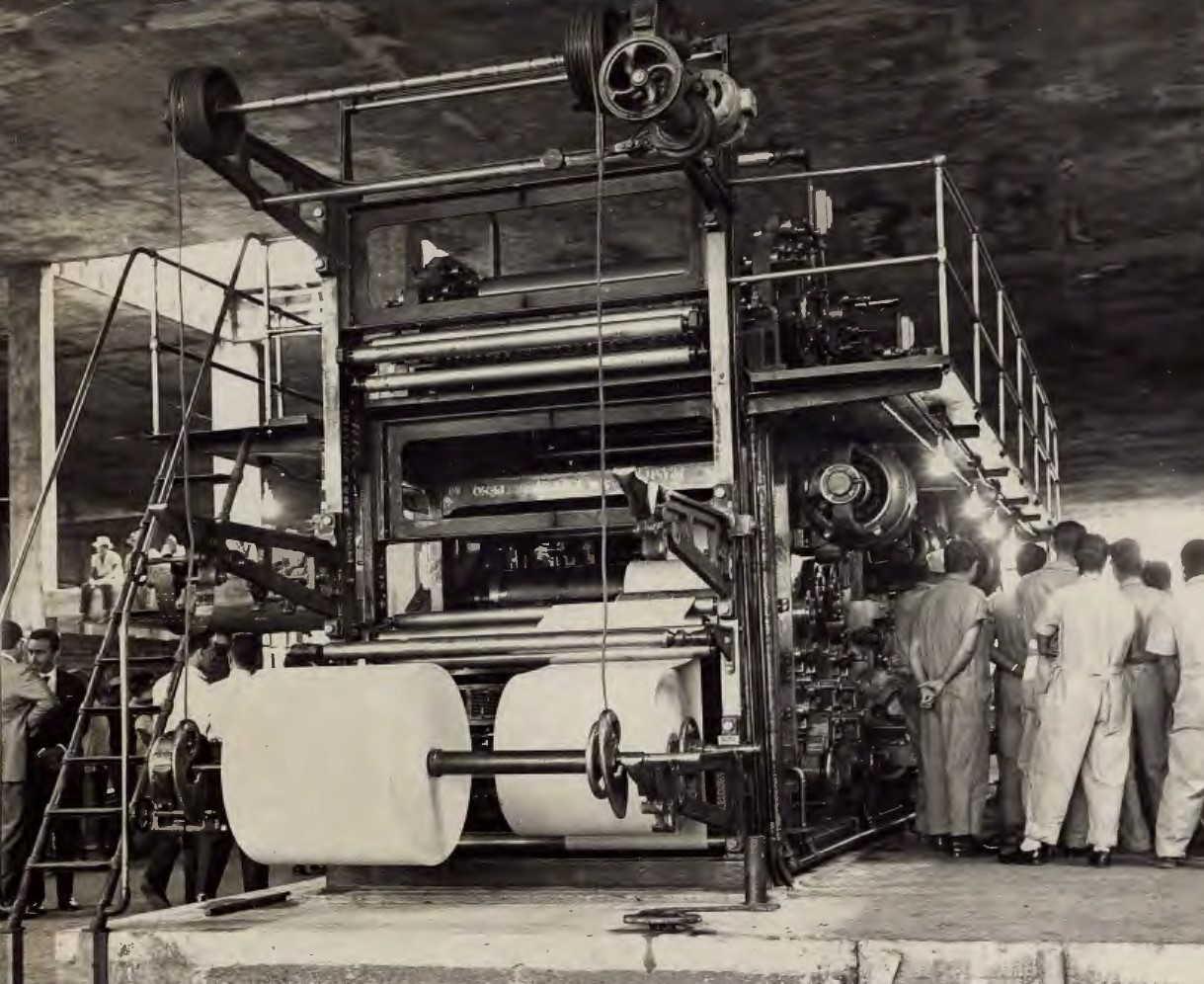 Fotografia do Fundo Correio da Manhã, sob a guarda do Arquivo Nacional.